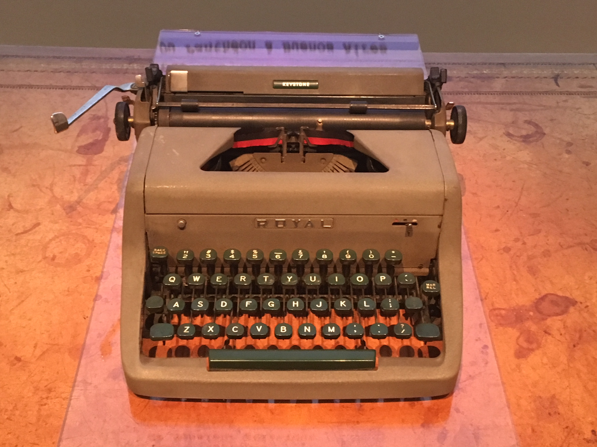 La machine à écrire de René Goscinny (exposition René Goscinny, Au-delà du rire, Paris, 9 février 2018).